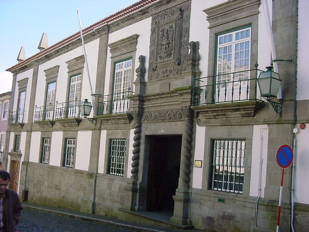 Category:Palácio Bettencourt